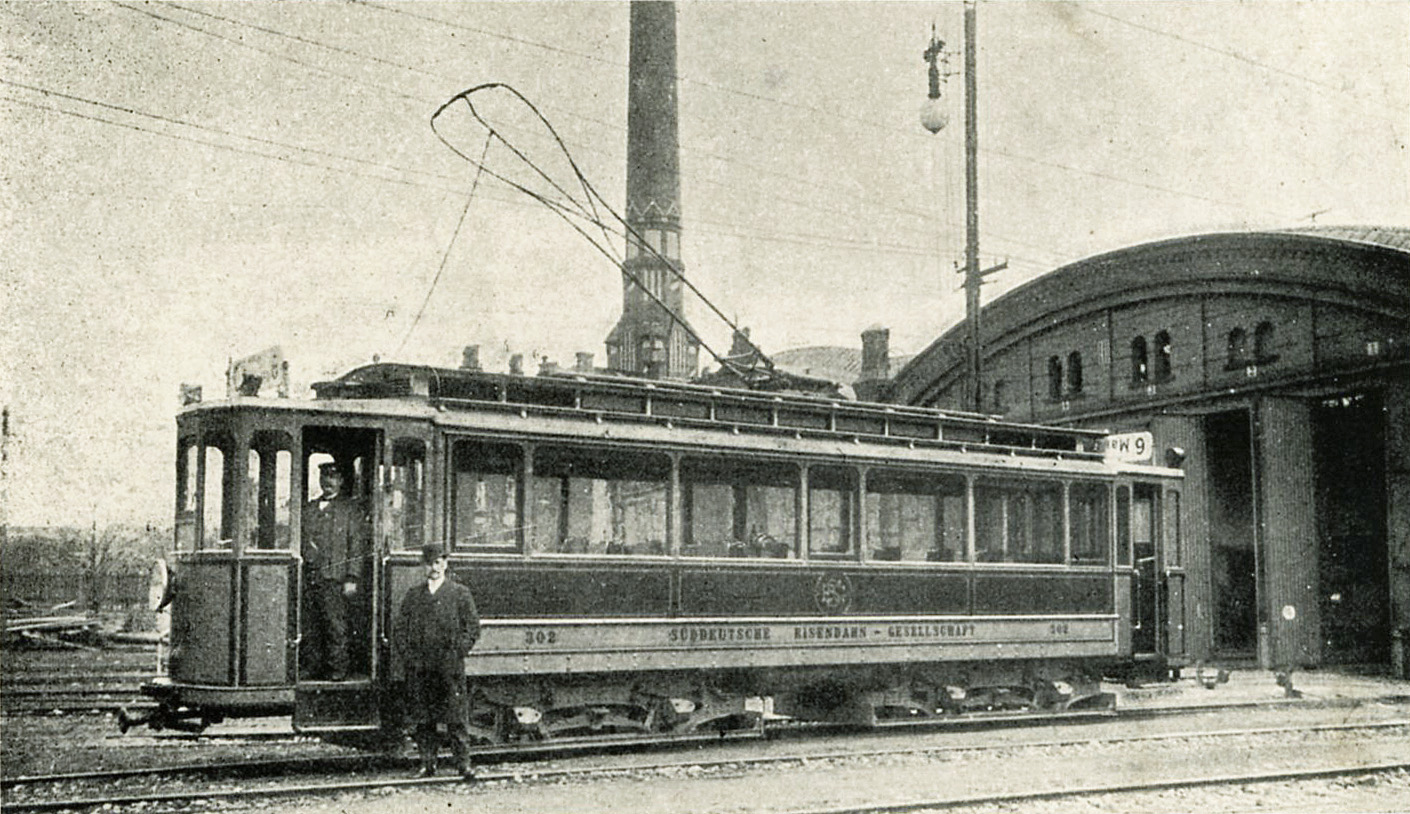 Elektrische Straßenbahn in der Stadt Wiesbaden (Eigentümer: Süddeutsche Eisenbahn-Gesellschaft, Darmstadt)